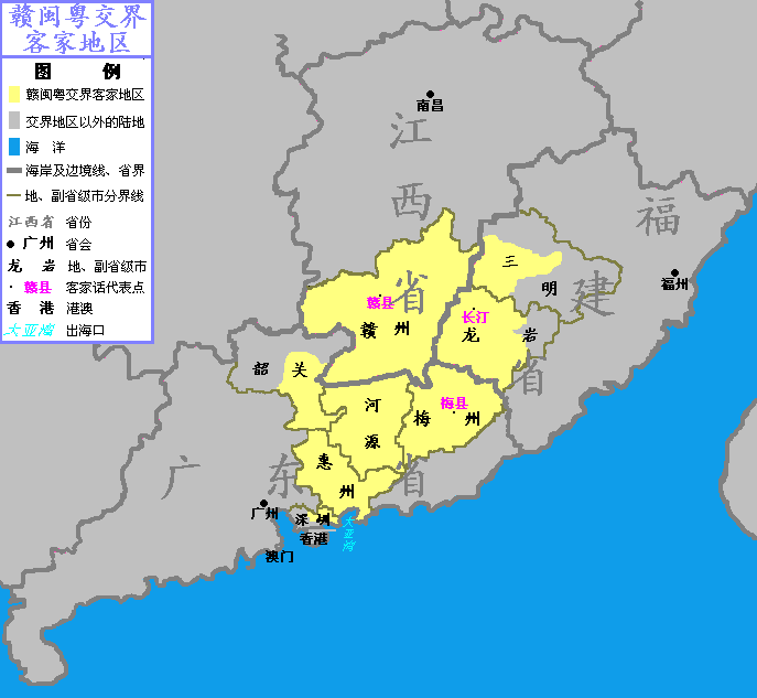 中文（中国大陆）: 赣闽粤交界客家地区。将分省市地图导入画图软件，用画笔描绘相关省市的轮廓，参照赣闽粤交界客家地区的行政区划图填涂、绘色修缮，填入相关地名，制作图例。